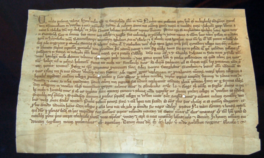 Schenkungurkunde des Ritters Heinrich II von Barmstede an das Nonnenkloster Uetersen aus dem Jahre 1285 (10 Febr.), lateinisch abgefasst. Erstmalige Erwähnung des Ortes "Esingen", heute ein Stadtteil von Tornesch. Fotografiert im Museum Langes Tannen in Uetersen.